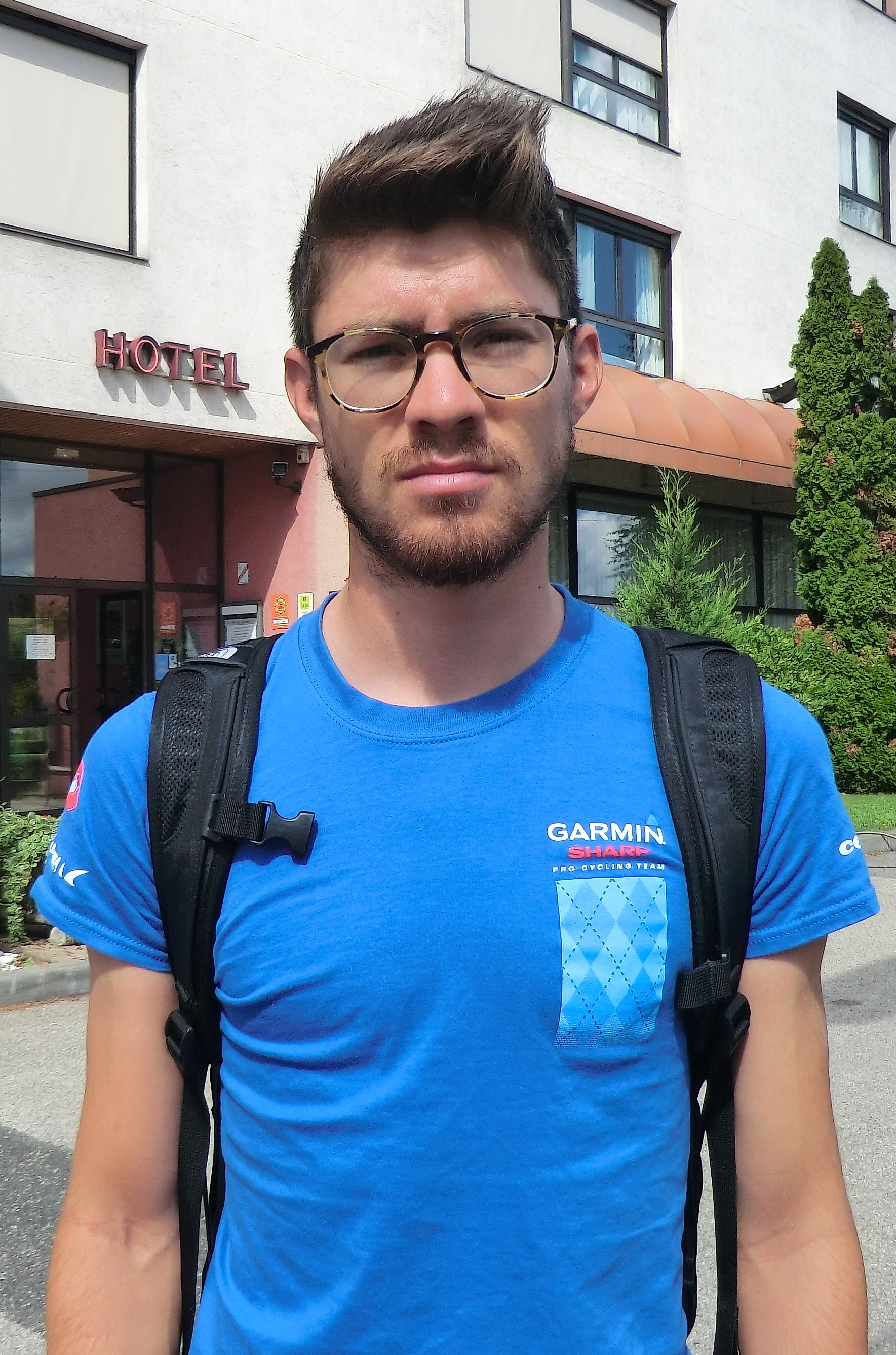 Coureur/directeur sportif au départ de l'hôtel : étape 1 du Tour de l'Ain 2013.